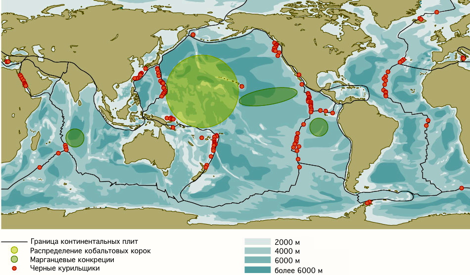 Распространие железомарганцевых конкреций